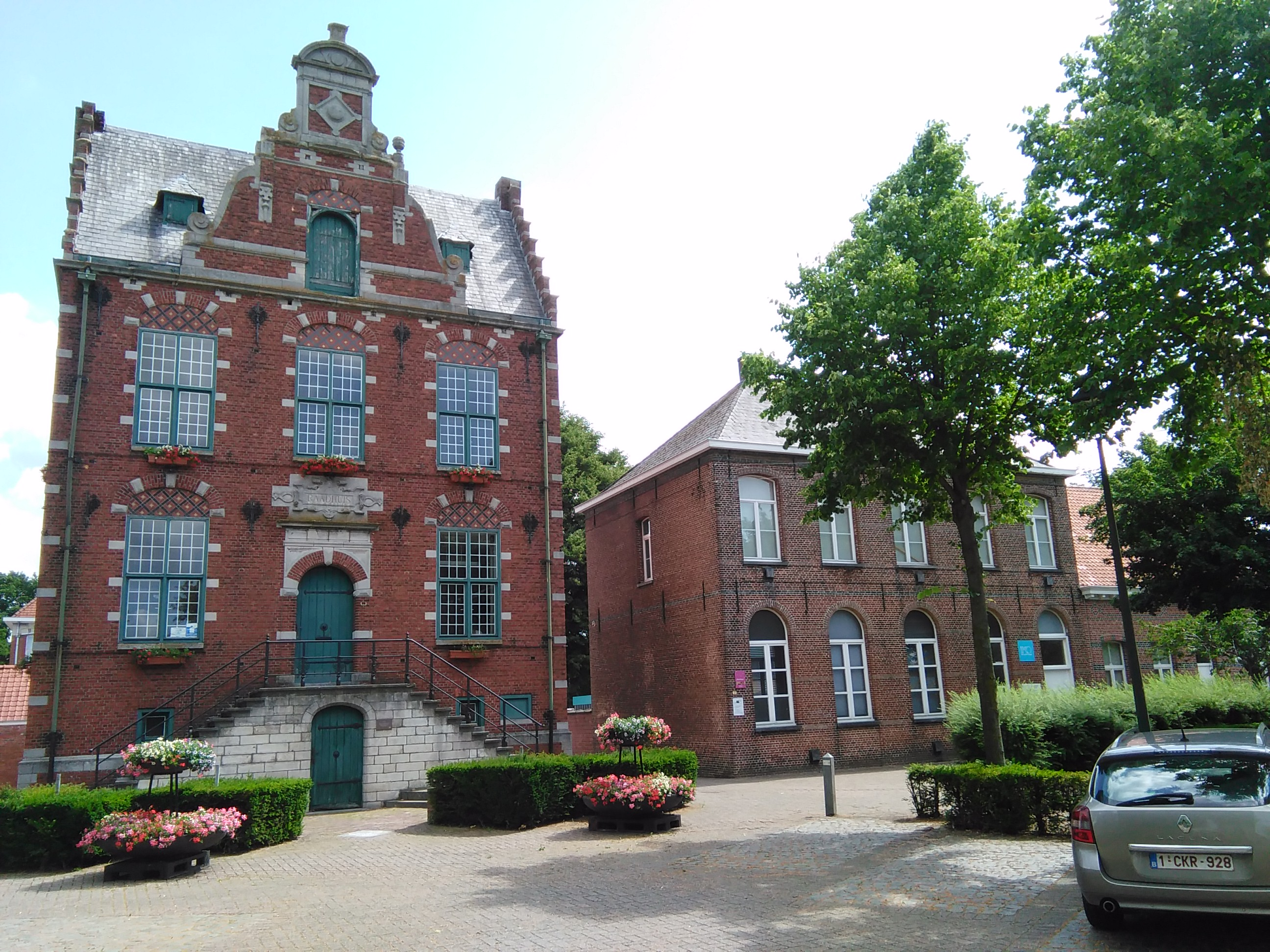 raadshuis en vrije basisschool van Meerle